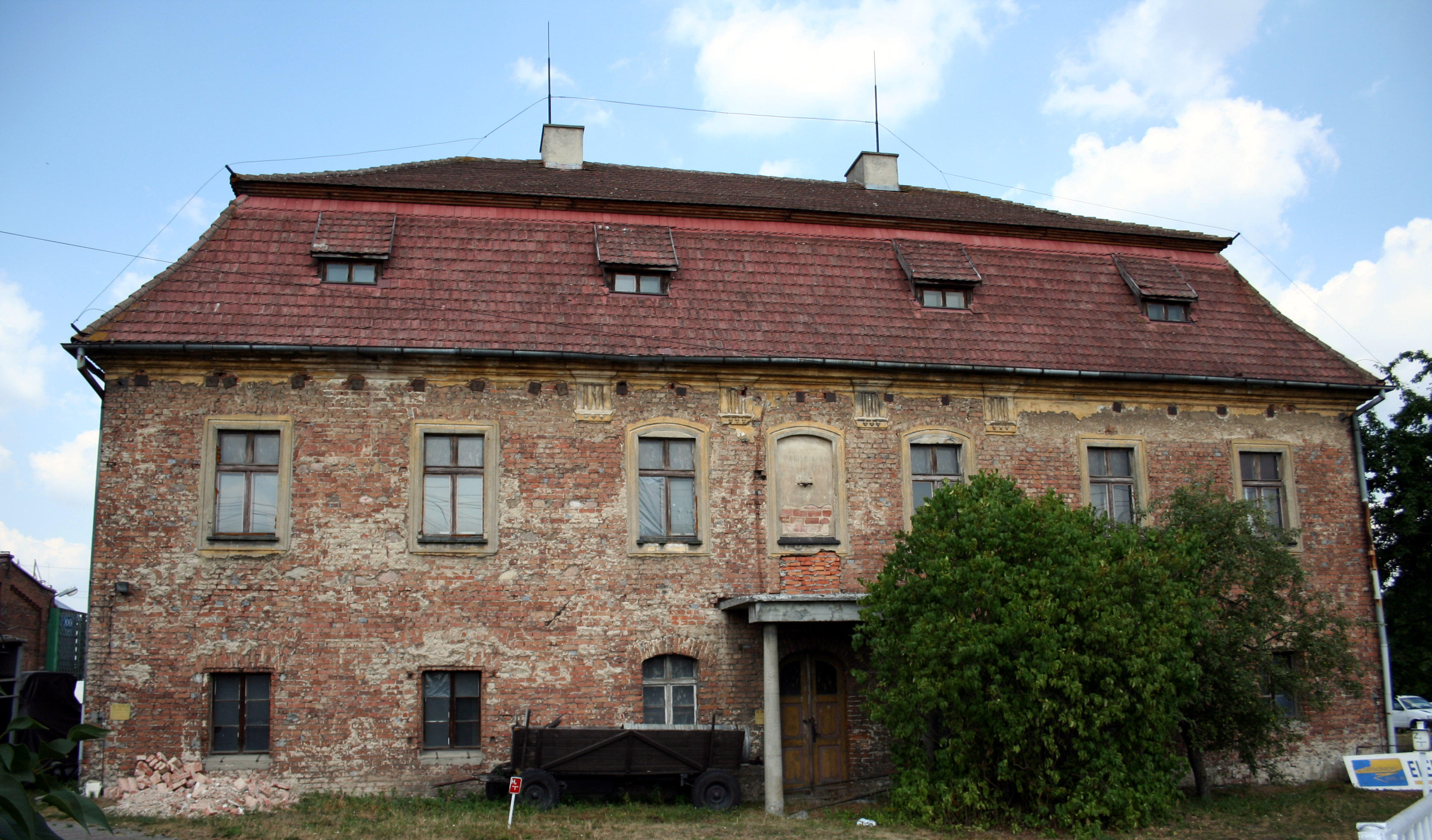 Dworek cysterski w Rybniku Stodołach